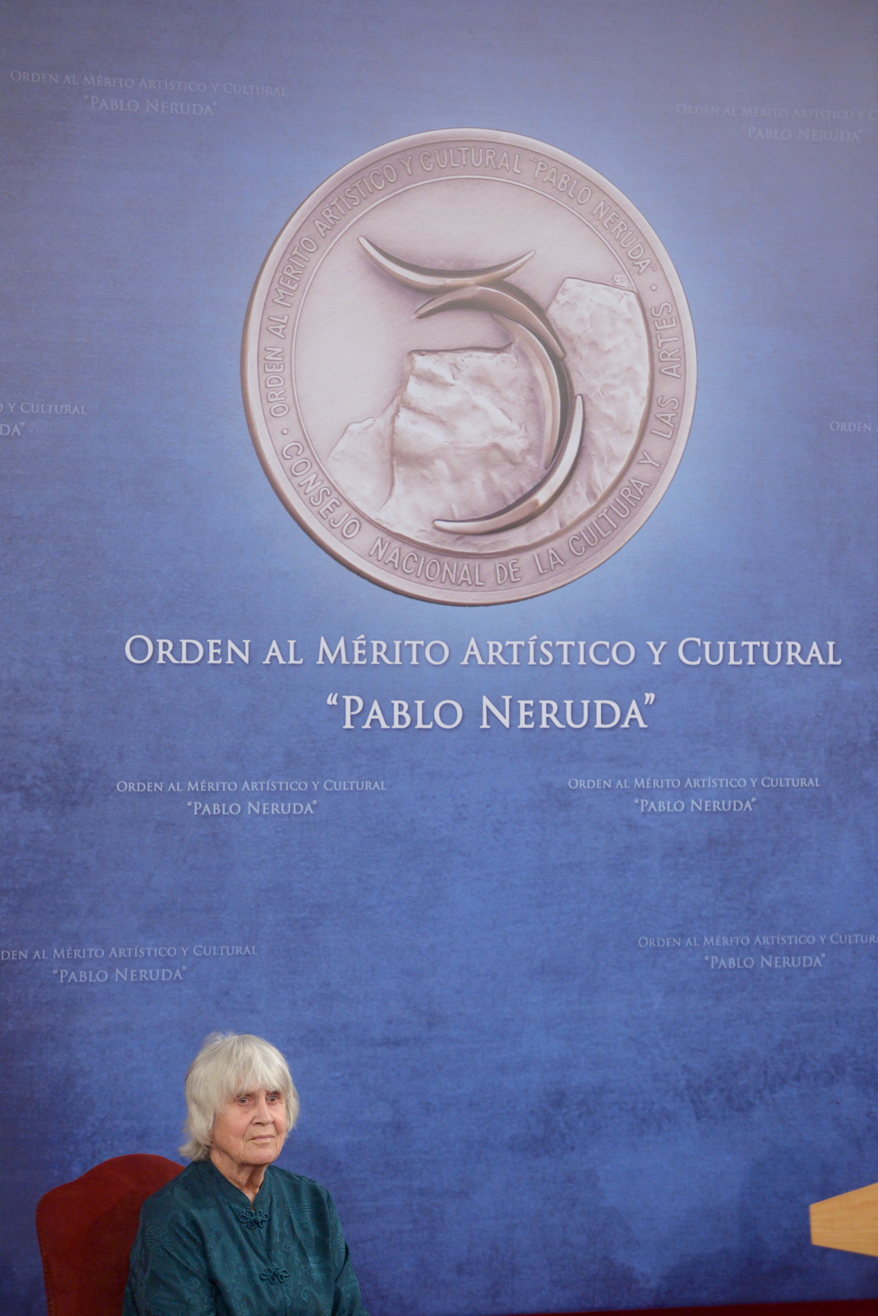 Presidenta de la República, Michelle Bachelet, otorga la "Orden al mérito artístico y cultural Pablo Neruda" a la bailarina y docente Joan Turner, viuda de Víctor Jara